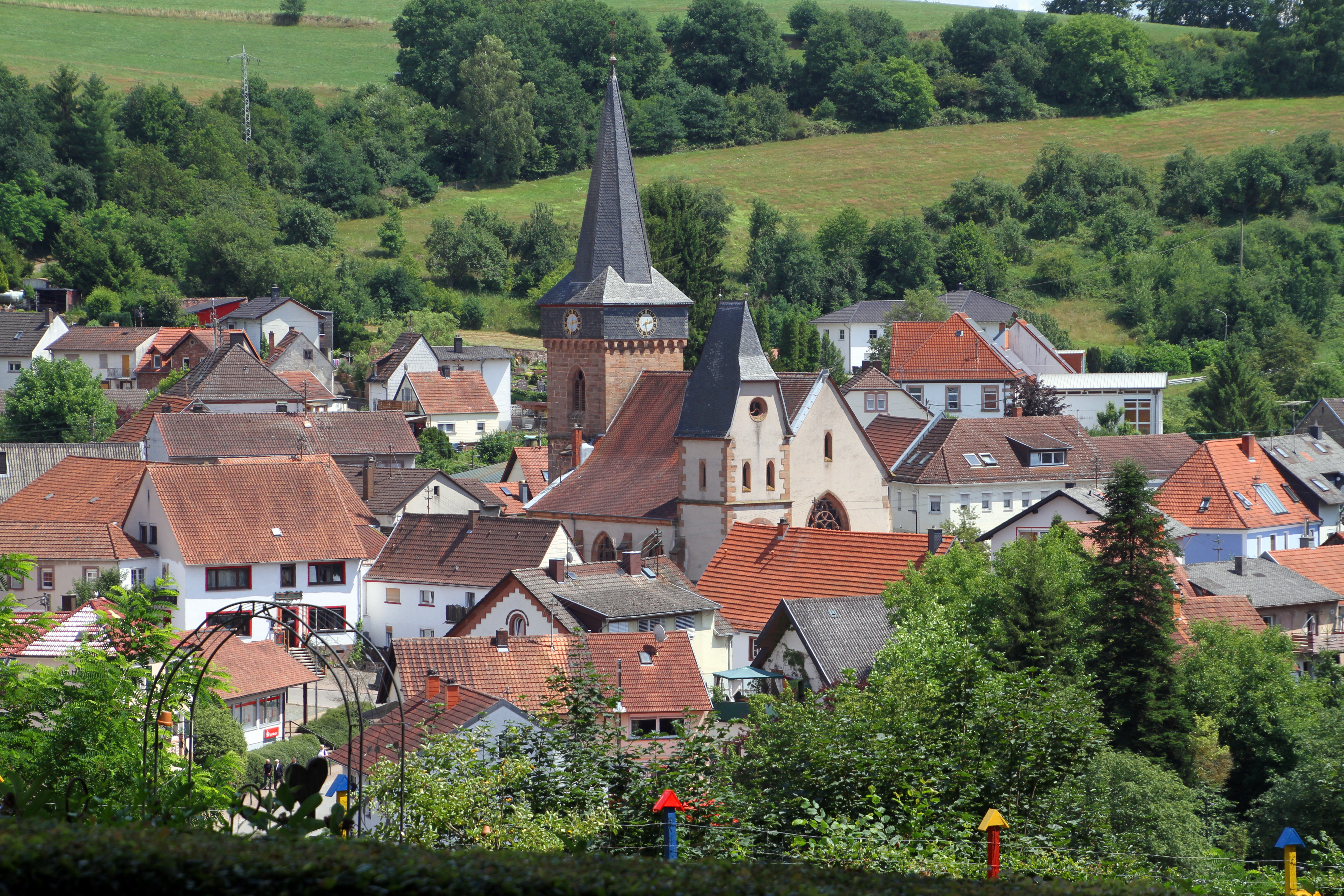 Wallhalben